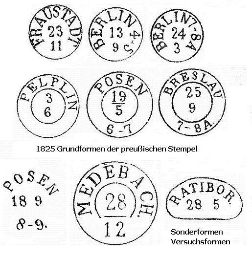 1830-1850 weiter preußische Stempelformen